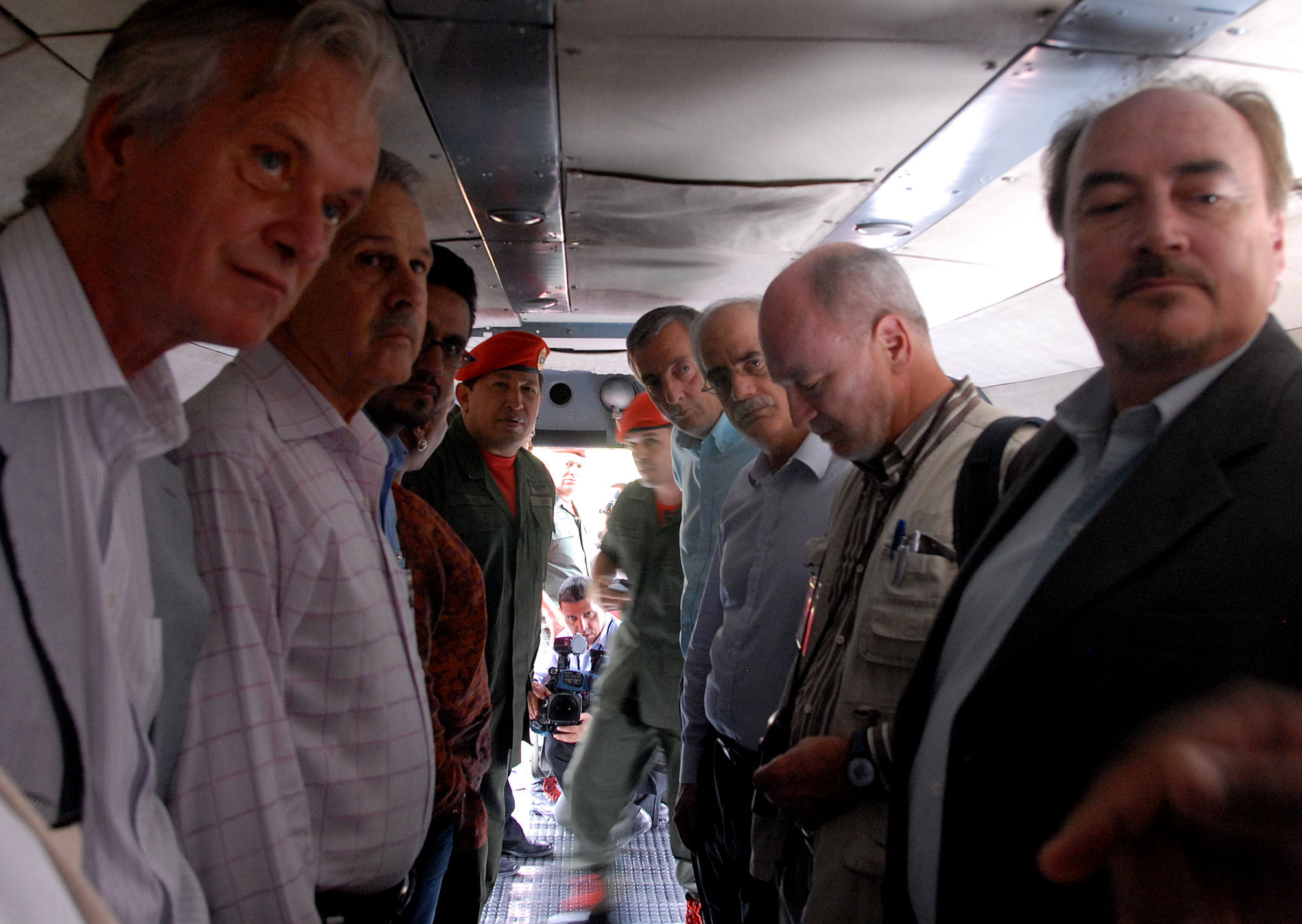 Hugo Chávez junto a los garantes de la "Operación Emmmanuel"